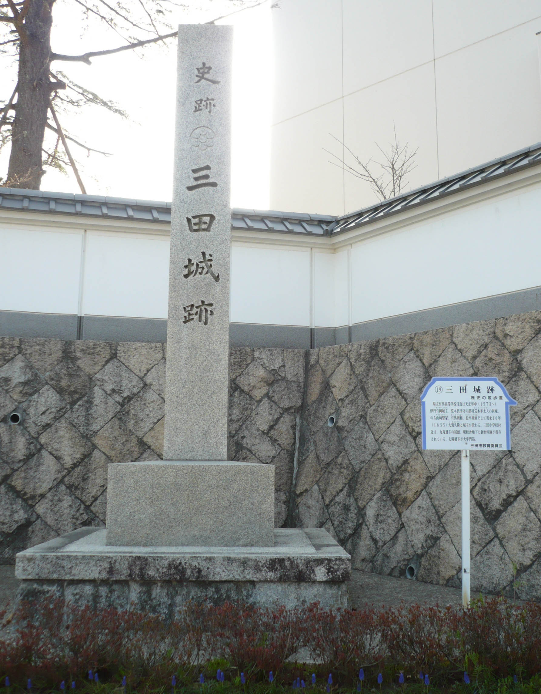 三田城の石碑